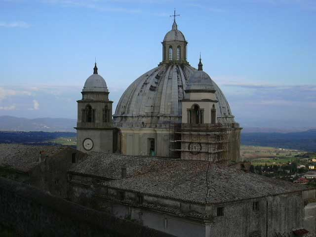 chiesa